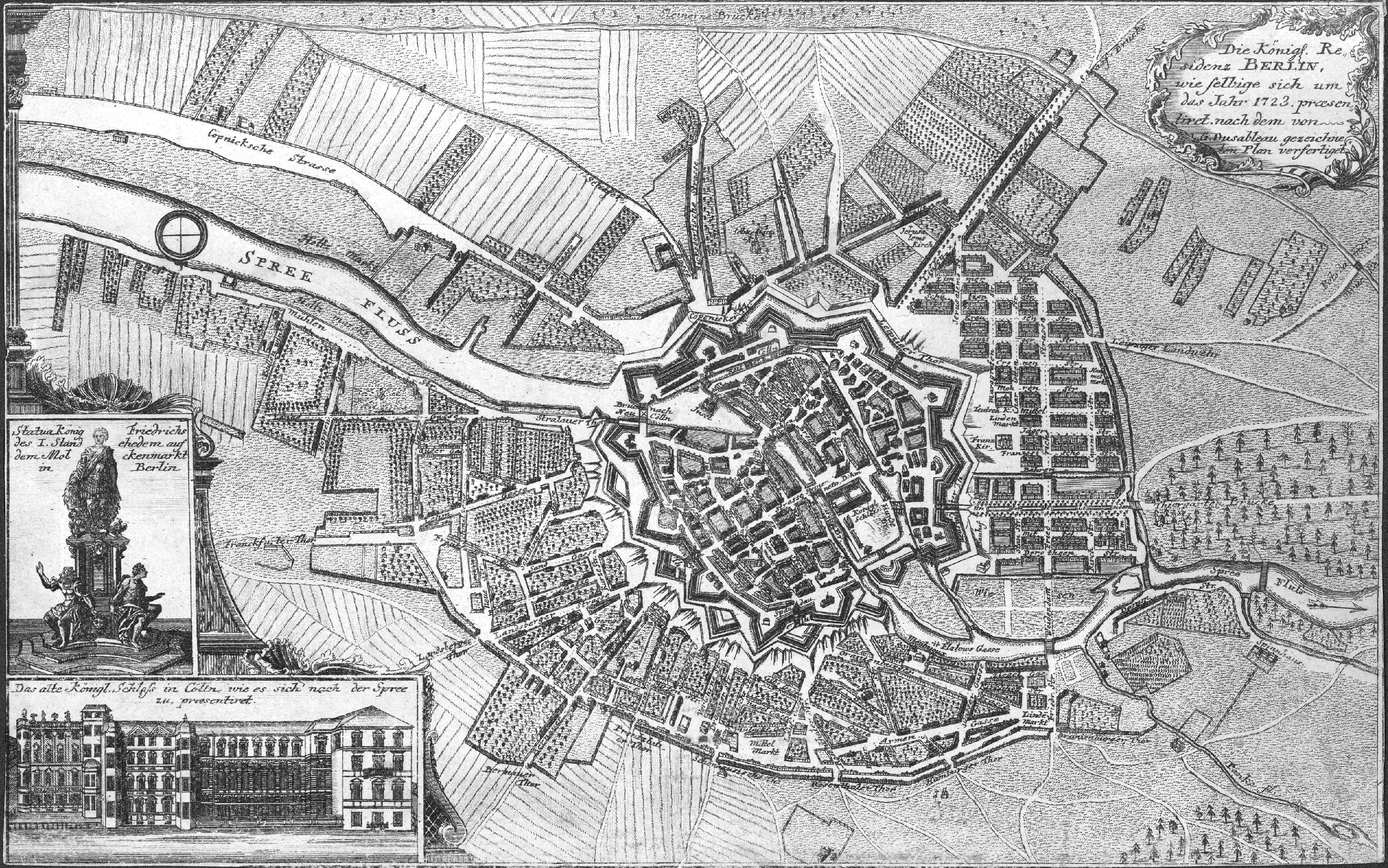 Der Titel steht rechts oben in einer Vignette. Links unten ist das Schloss, darüber die Statue König Friedrichs des I. auf dem Molckenmarkt in Berlin abgebildet. Links oben ist eine Windrose in die Spree eingezeichnet. Gebäude sind perspektivisch abgebildet.